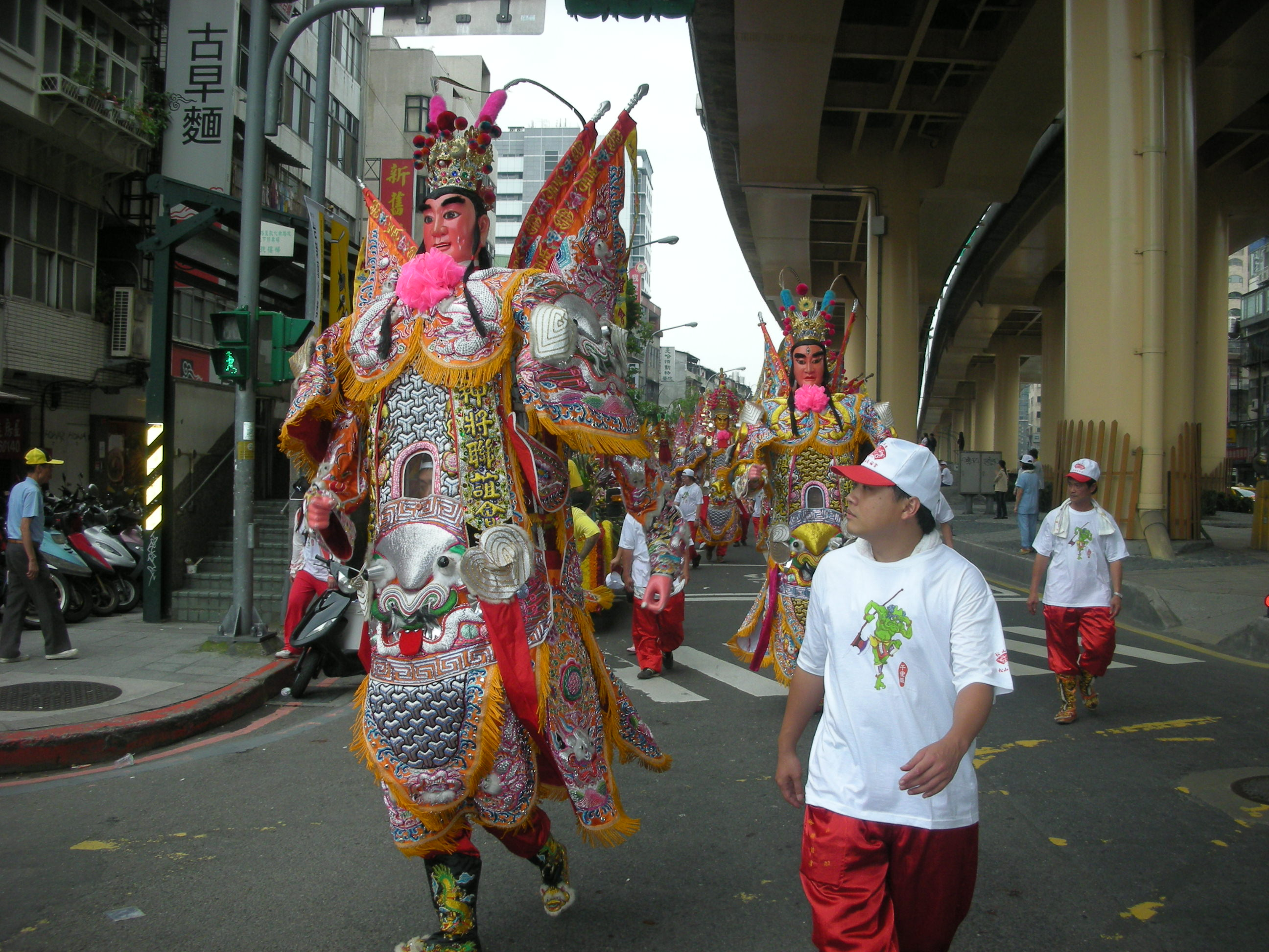 迎神繞境